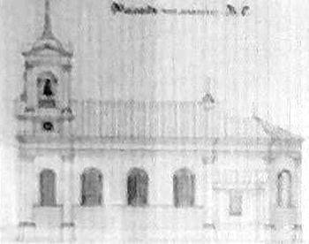 Беларуская (тарашкевіца): Вялейка (Vialejka), вуліца Юраўская (vulica Juraŭskaja). Стары касьцёл